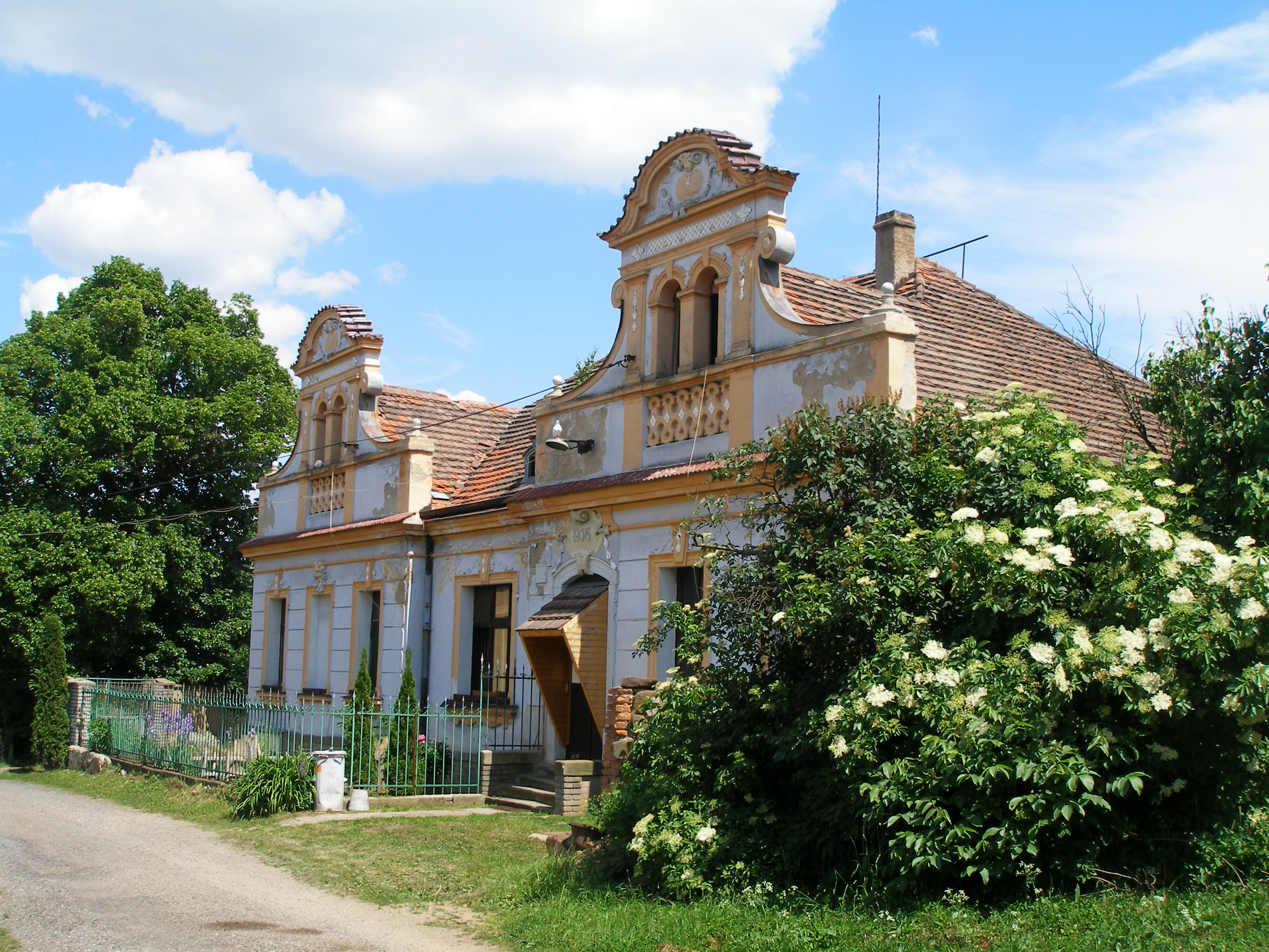 Dům čp. 39 v Hobšovicích.